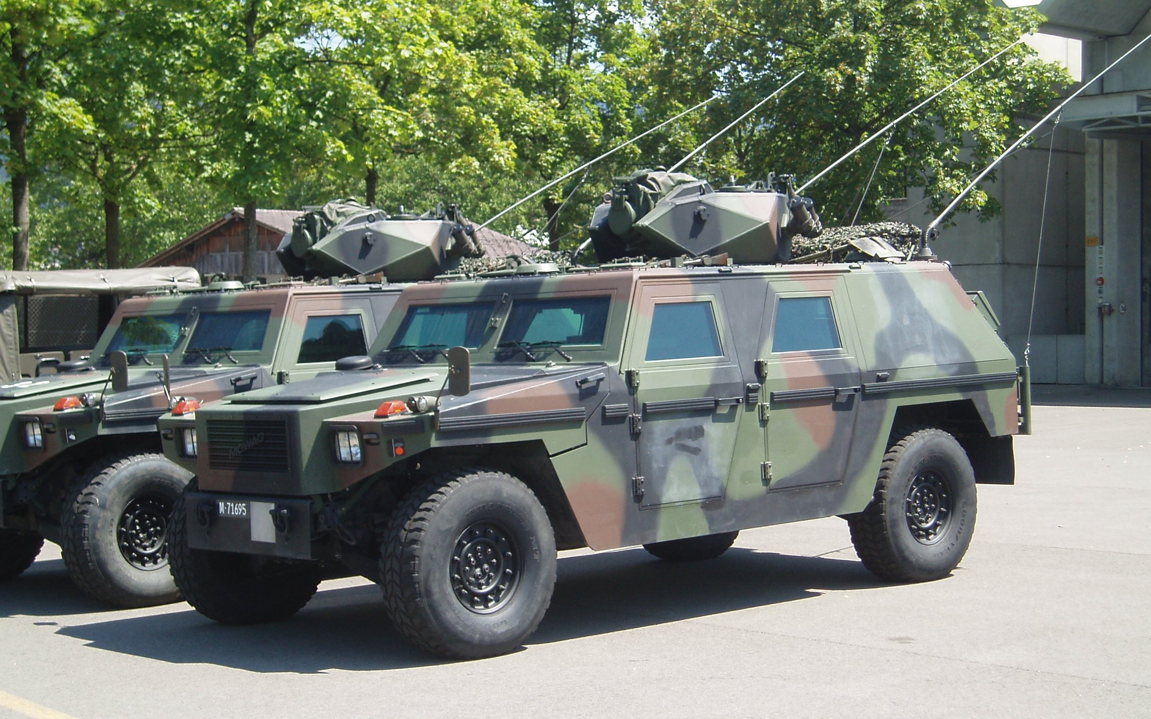 Militärfahrzeug Eagle II der Schweizer MOWAG